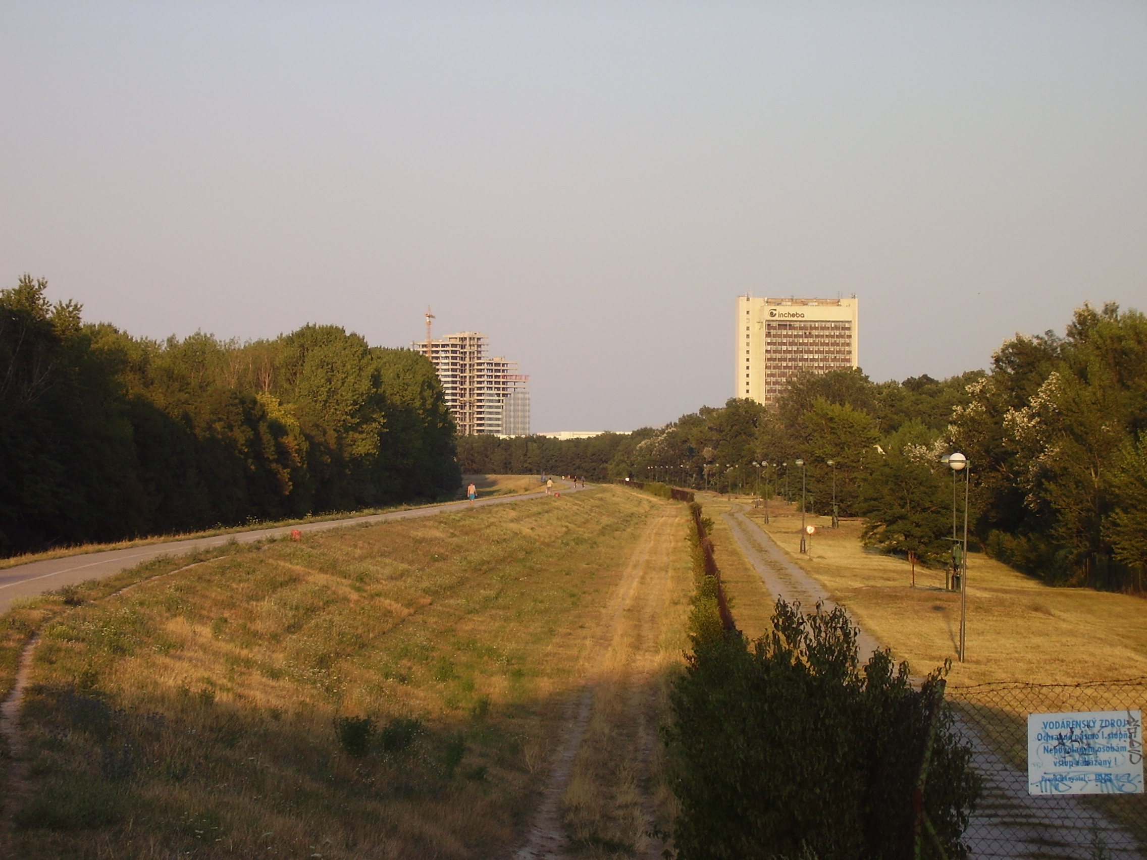 Bratislava